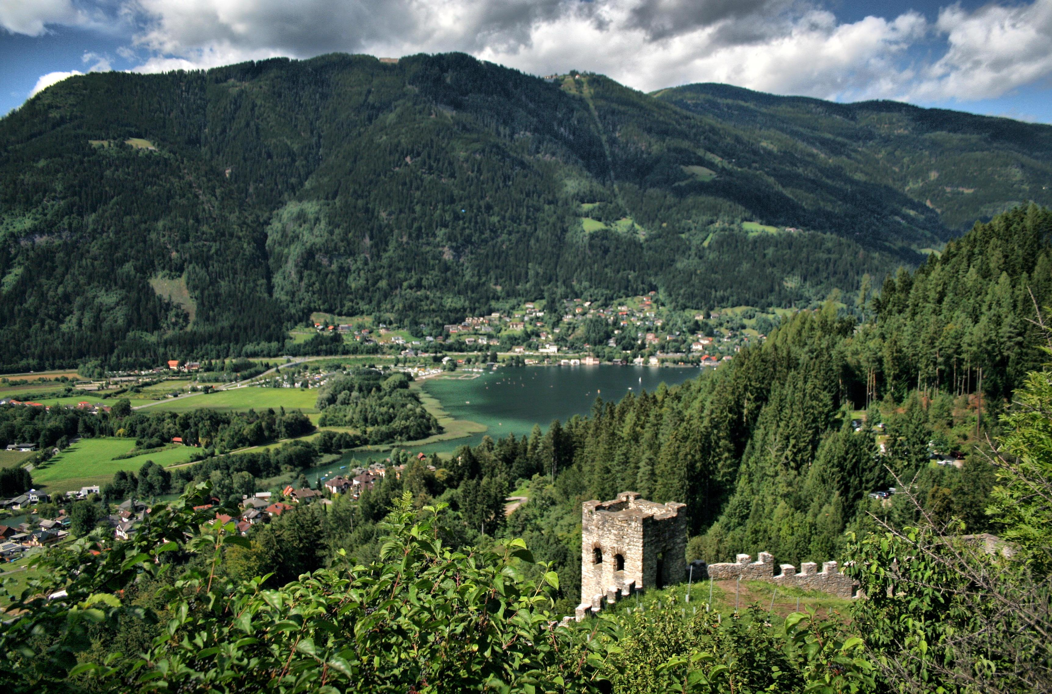 Westufer des Ossiachersees; im Vordergrund: Burgruine Landskron und der Ort St. Andrä im Stadtgebiet von Villach; im Hintergrund der Ort Annenheim in der Gemeinde Treffen am Fuße der Gerlitzen